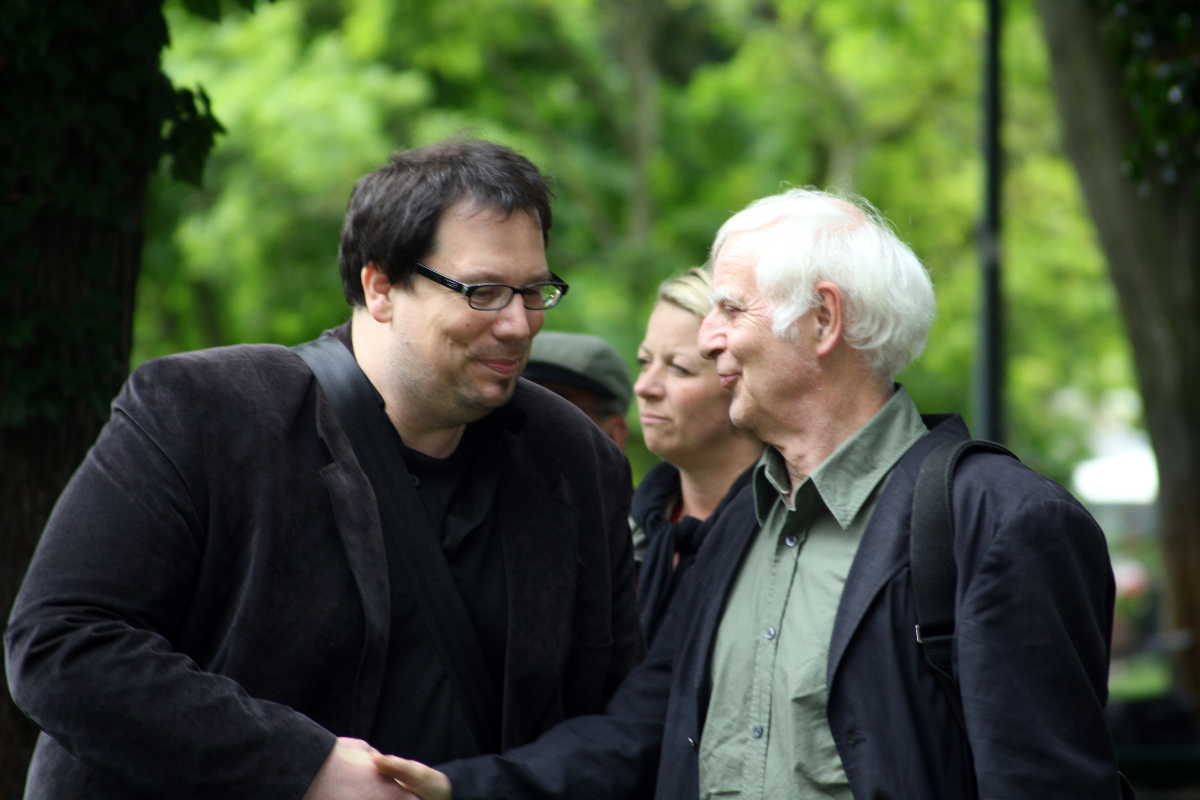 Bodo Birk, Leiter des Erlanger Poetenfests, begrüßt den Schriftsteller Adolf Muschg